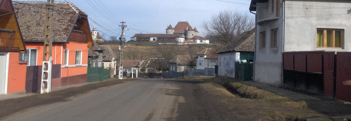 The palace from Cetatea de Baltă, Alba County, Romania